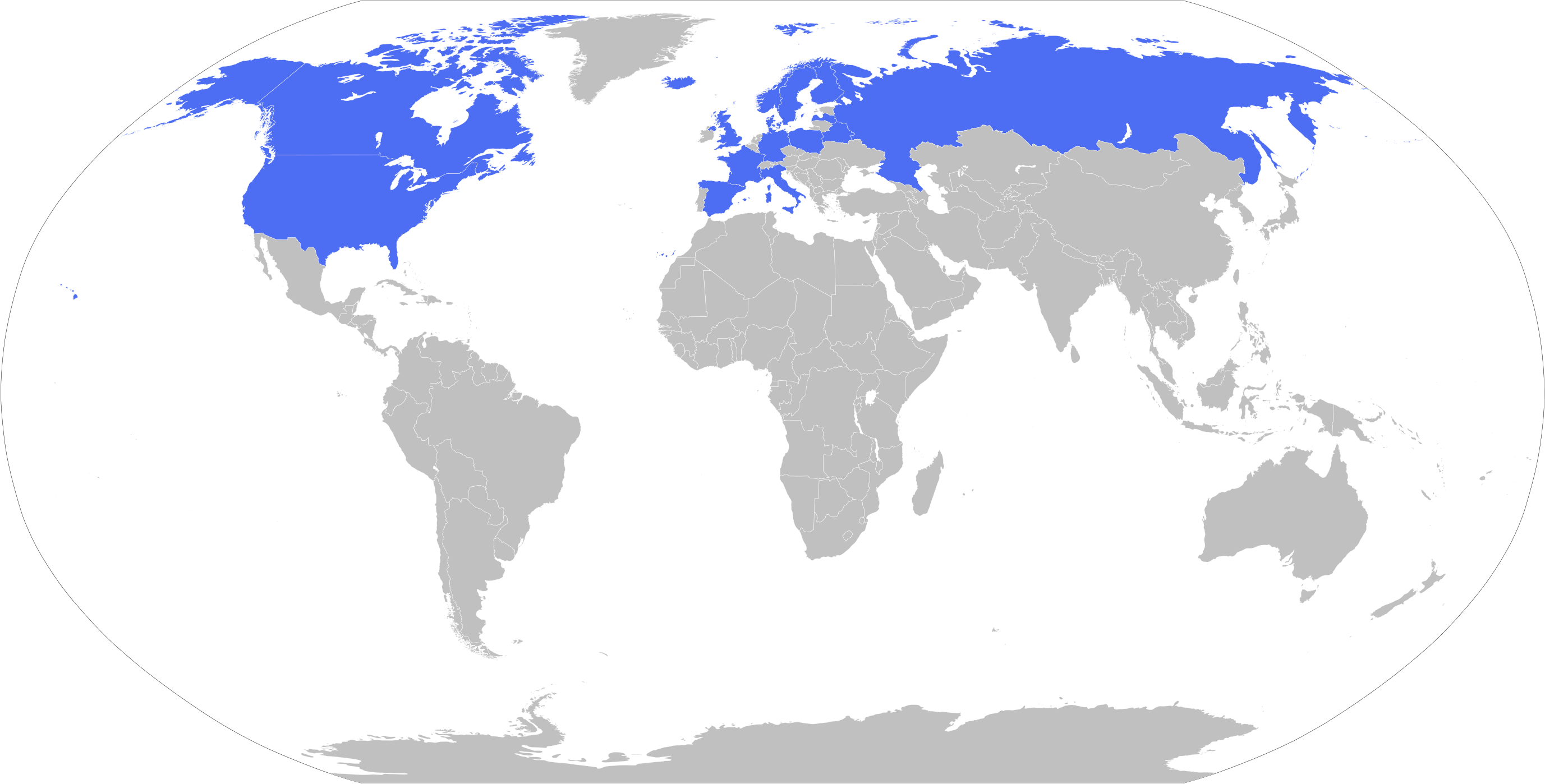 Kart over land hvor Nidarosdomens Guttekor har holdt konserter.